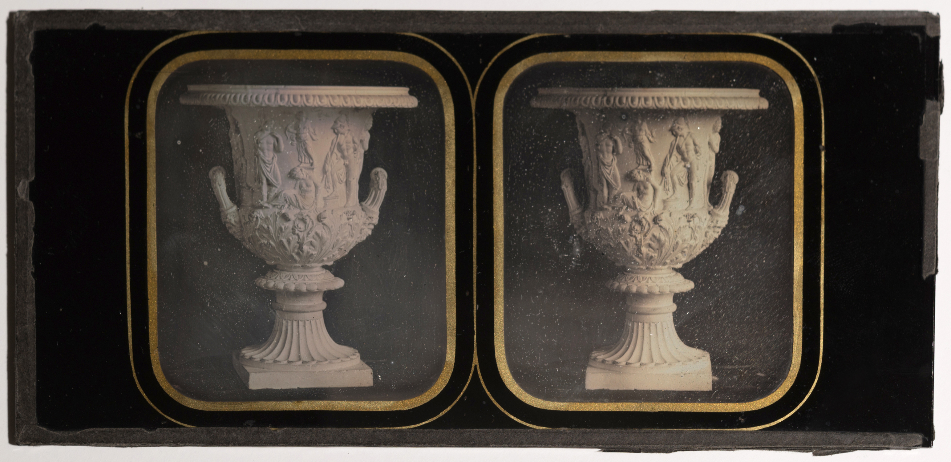 Dagerrotüüp Tartu Ülikooli Raamatukogu kollektsioonis. Daguerreobase:F-169_s-3